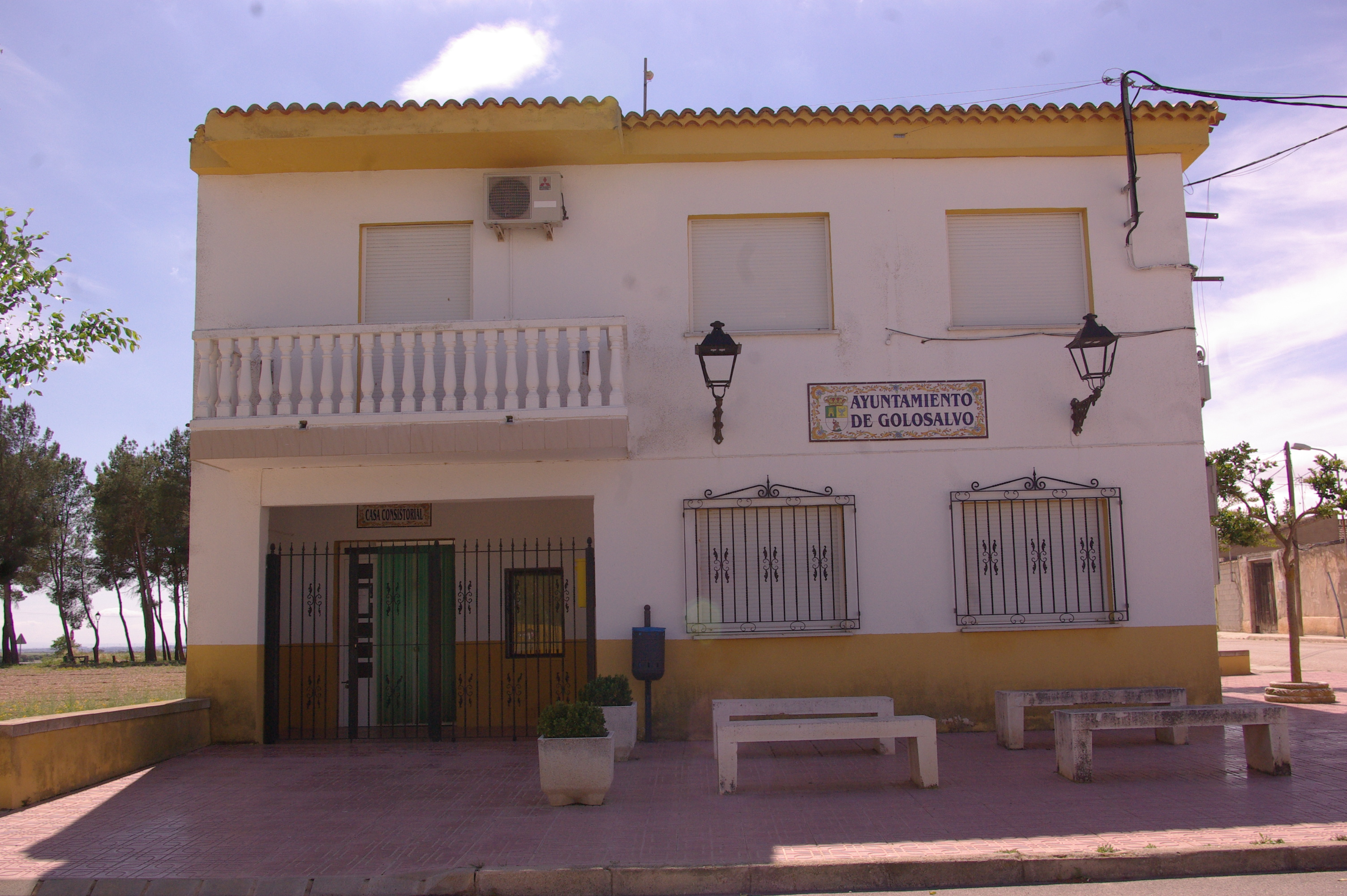 ayuntamiento de golosalvo